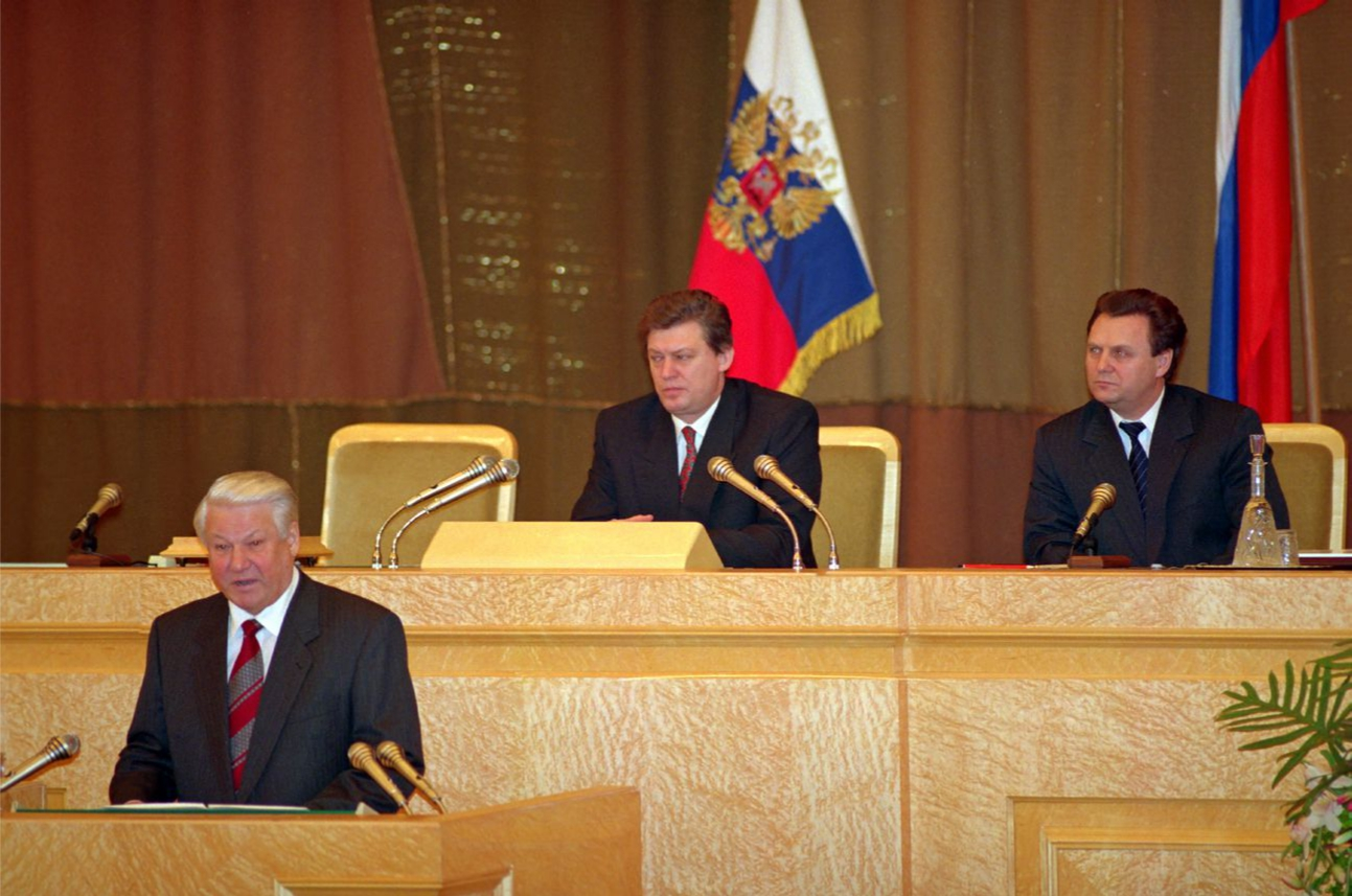 Оглашение Послания Федеральному Собранию Президентом России Б.Н. Ельциным. В Президиуме Председатель Совета Федераций В.Ф. Шумейко, Председатель Государственной Думы И.П. Рыбкин. Кремль. 16 февраля 1995г. фото Н.Е. Малышева